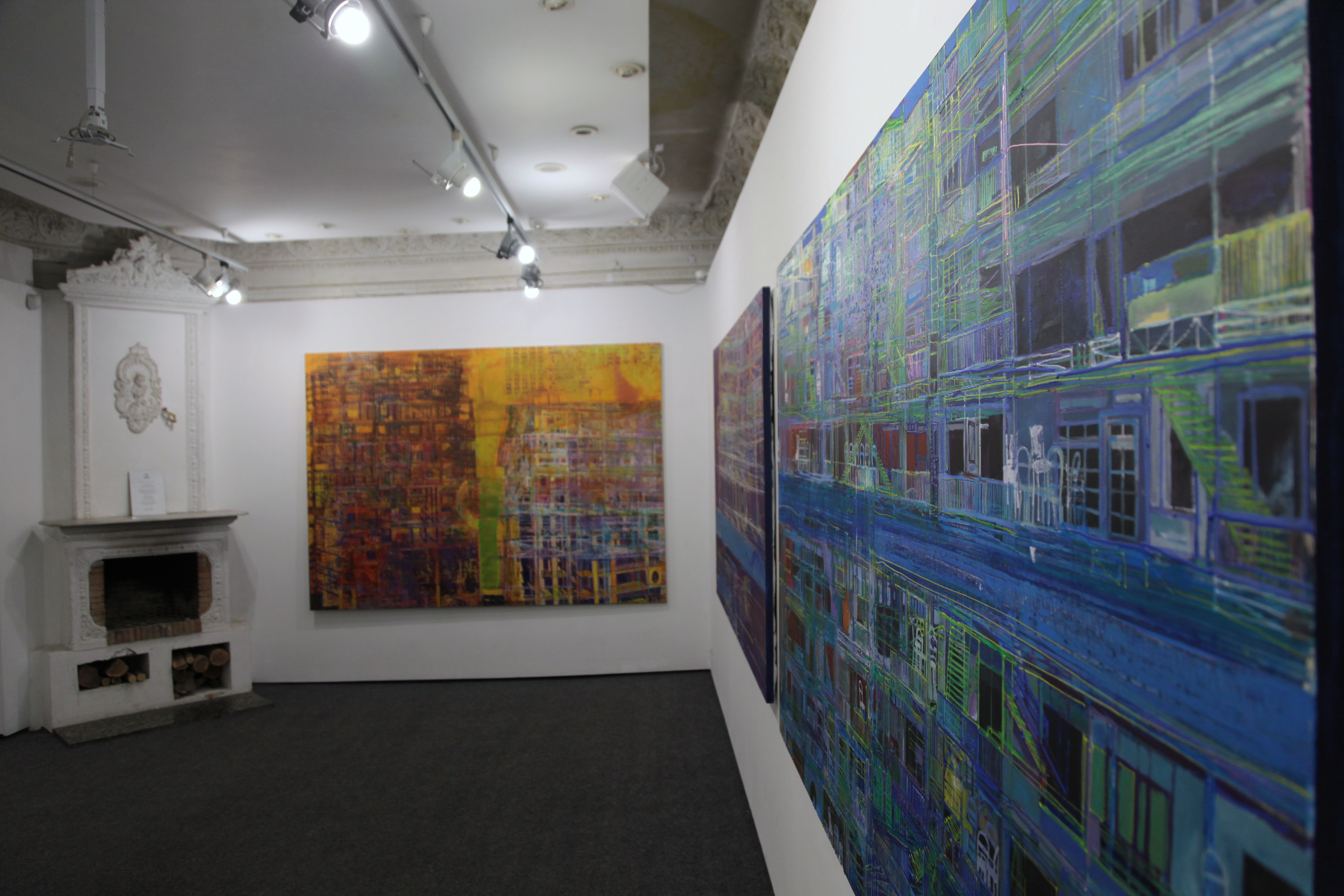 Карась Галерея. Експозиція виставки "Соціополіс" Андрій Блудов. 2017 рік.